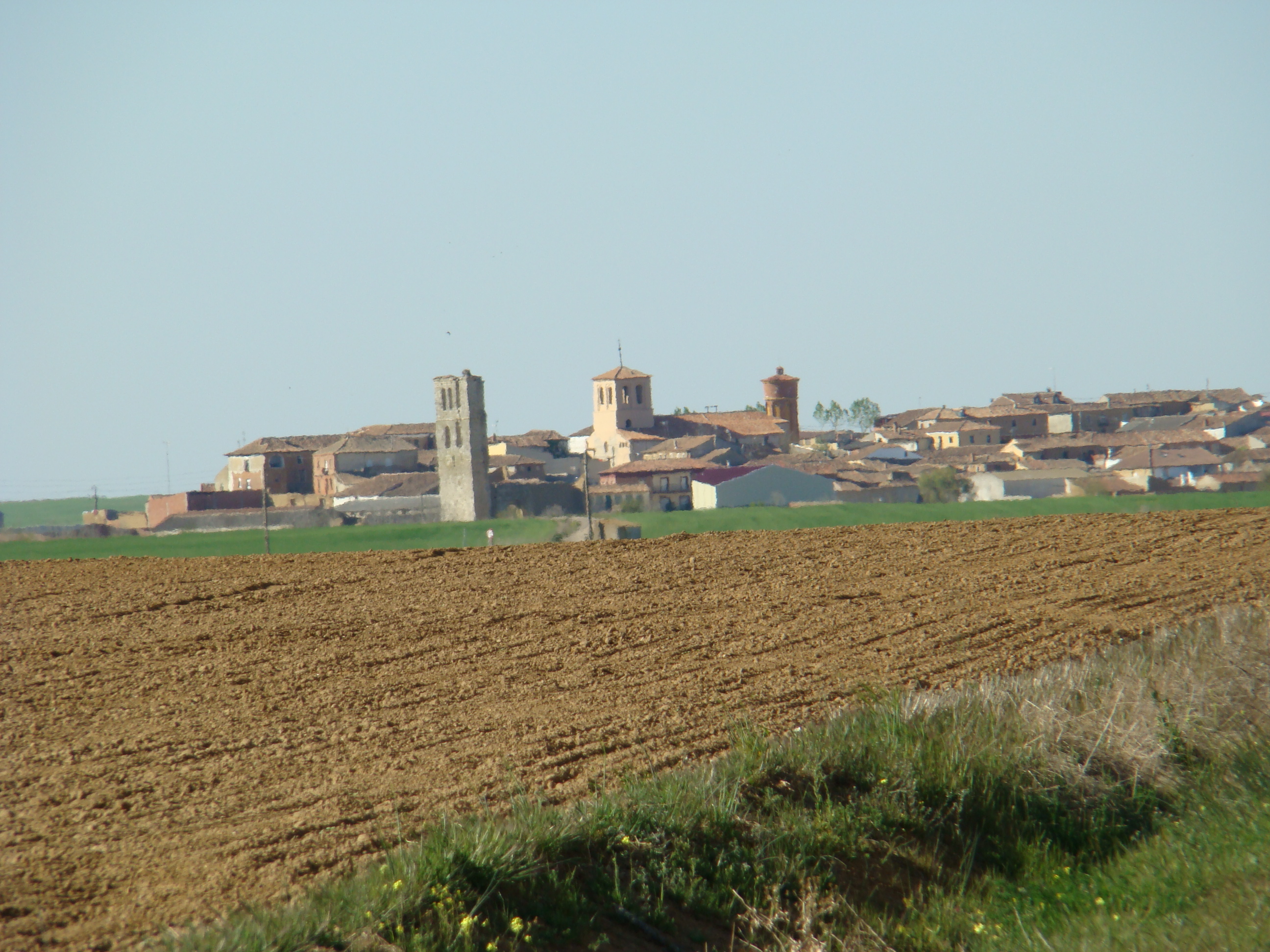 Vista general de Tamariz de Campos, provincia de Valladolid, España. La foto está tomada desde el Canal de Castilla.